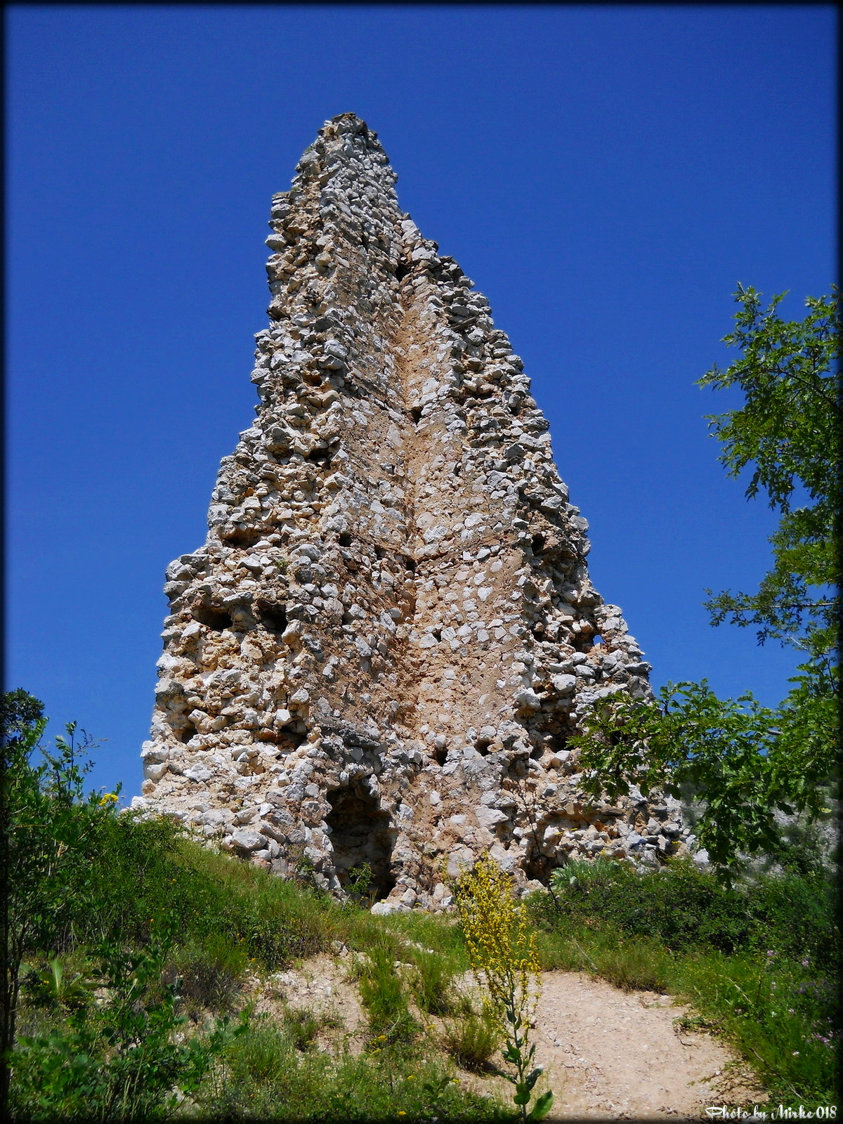 Средњевековно утврђење Железник (Кула) из 14 века.